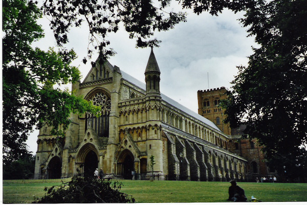 St. Albans katedral i St. Albans, England. Foto Cnyborg, juli 2003.